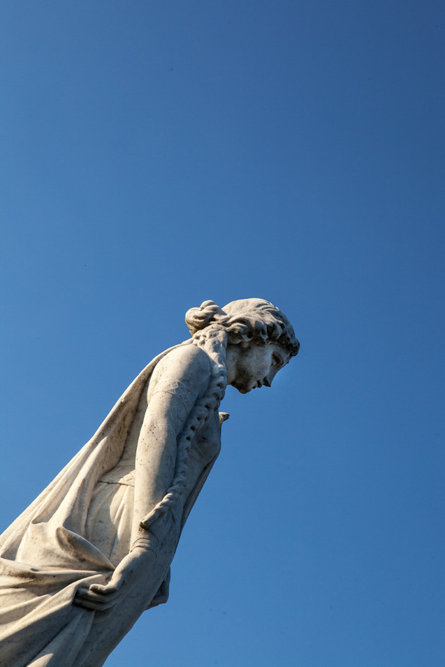 C’est en ce lieu, dit « le carrefour des trois ormeaux », que Reine, jeune bergère de 15 ans, native du village voisin de Grignon et élevée clandestinement dans la foi chrétienne par sa nourrice, fit, en 253, la rencontre du préfet Olibrius accompagné de son escorte. Nous sommes alors au temps de l’empereur Valérien, de sinistre mémoire (comme ses prédécesseurs) chez les chrétiens d’alors.